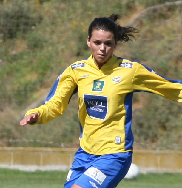 Fotballspilleren Tina Wulf